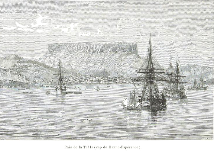 Arthur Mangin, Voyages et Découvertes outre-mer au XIXe siècle, illustrations par Durand-Brager, 1863. Capitaine Louis de Freycinet, Cap de Bonne-Espérance 7 mars 1818.